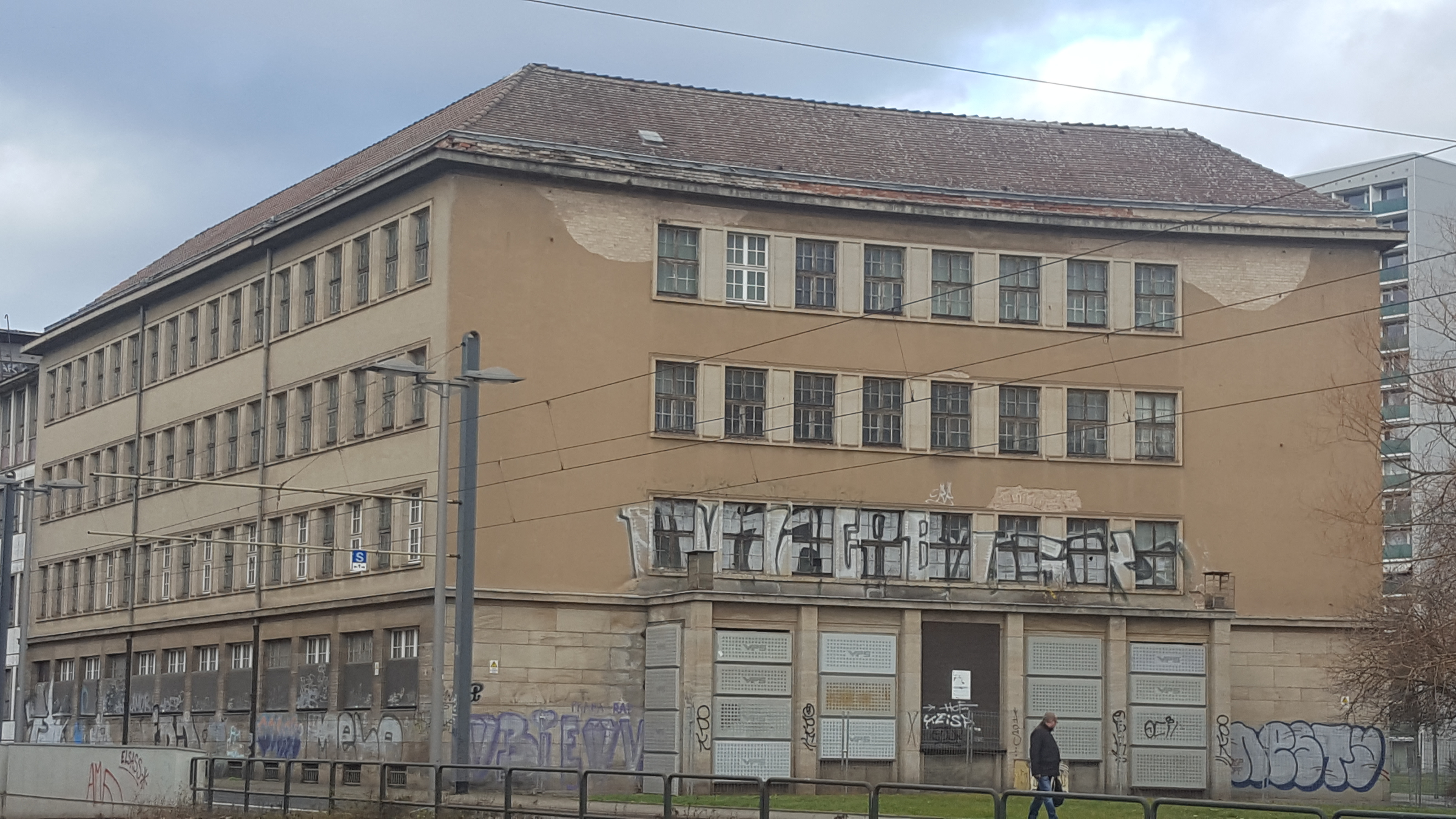 Dresden: Erweiterungsbau Reichbahndirektion an der Wiener Straße 5b; 1935 bis 1936, Architekt Richard Spröggel